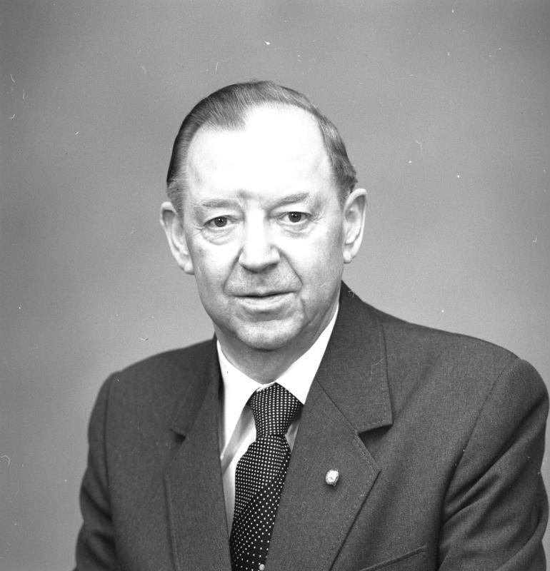 ADN-ZB/Reiche/18.2.81/ Gerhard Grüneberg, Mitglied des Politbüros und Sekretär des ZK der SED.